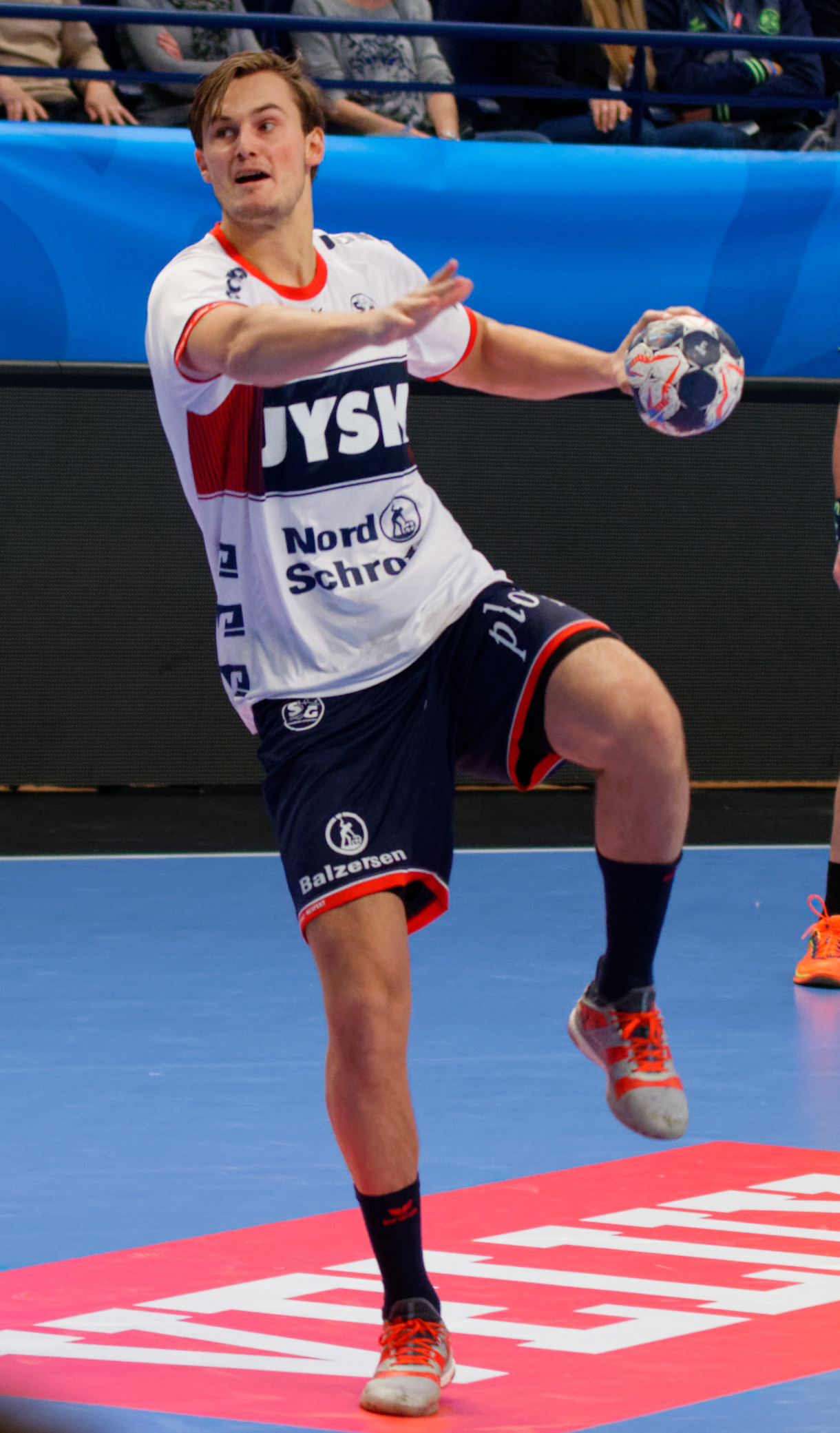 Rencontre de phase de groupe de la ligue des champions 2017/18 entre le PSG et SG Flensburg. A Coubertin, le 17 février 2018.